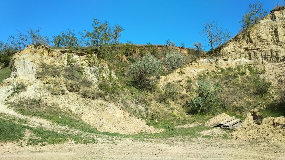 Afloriment de argile etuliene, monument al naturii amplasat în Găgăuzia, panta stângă a văii râului Cahul deasupra satului Etulia (cod MD-GE-mn.A-084) A-084